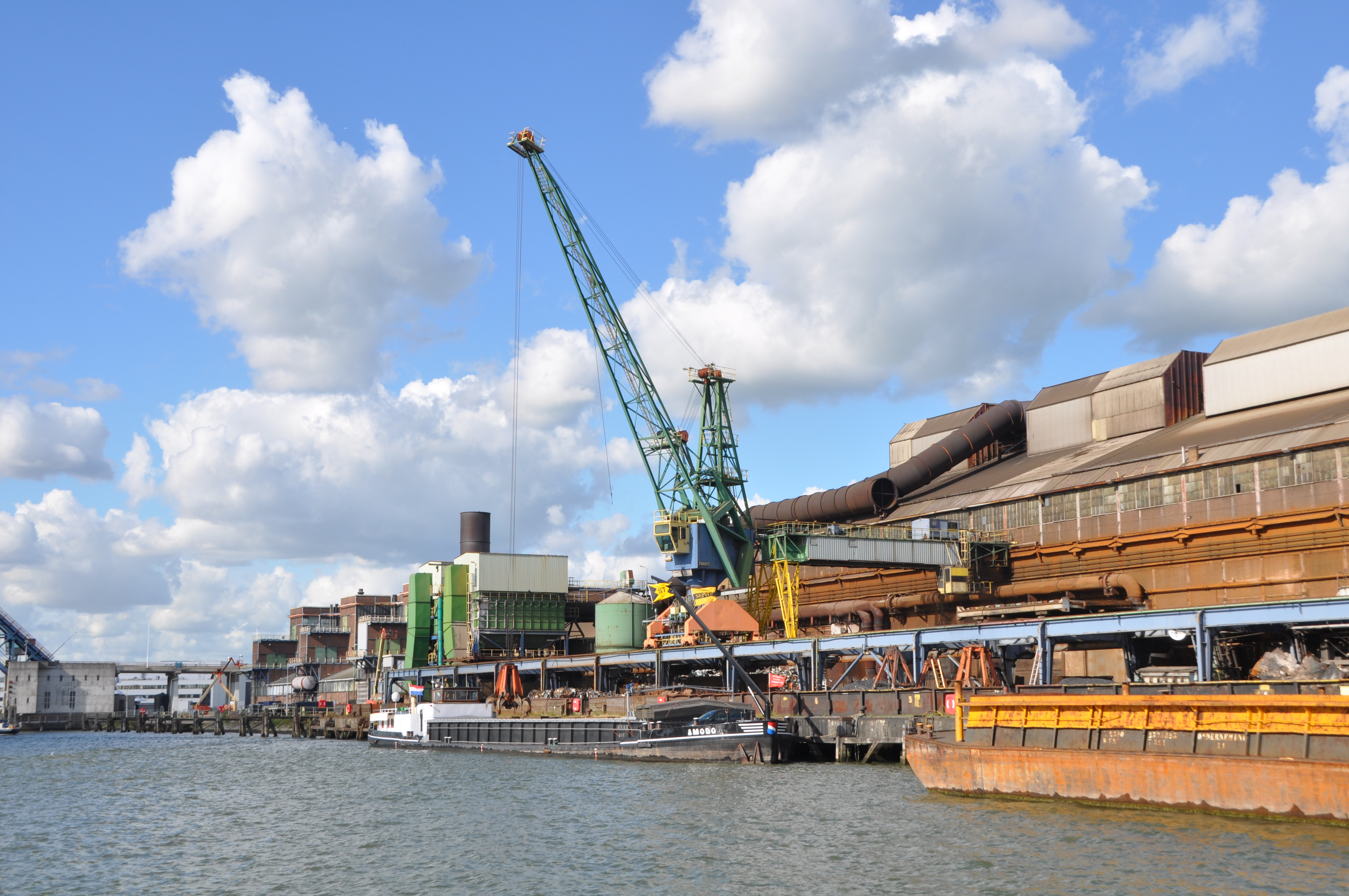 De AMODO aan het lossen bij de kabelfabriek in Alblasserdam